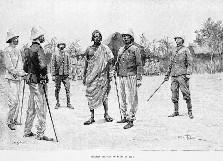 Behanzin arrivant au poste de Goho le 24 janvier 1894.